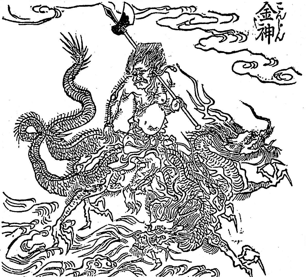 God of Konjin. 金神